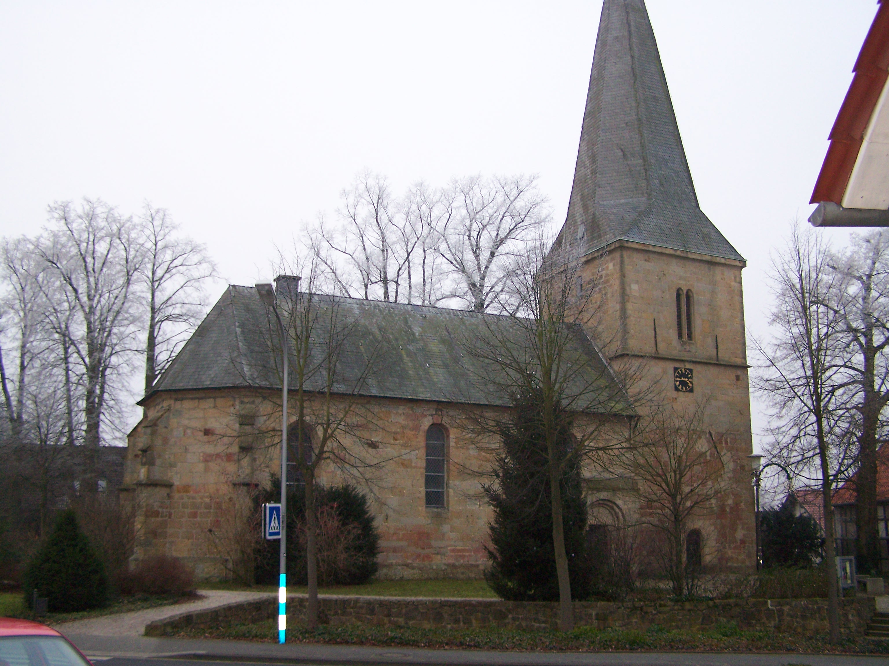 Die Ledder Dorfkirche. This is a photograph of an architectural monument.